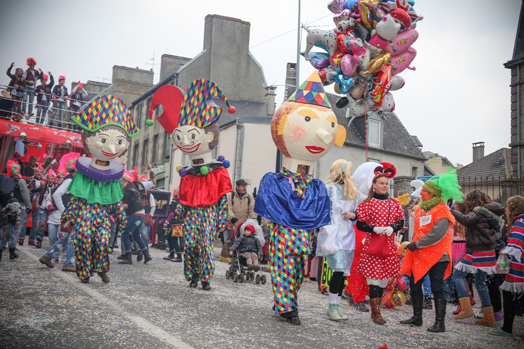 Cavalcade humoristique